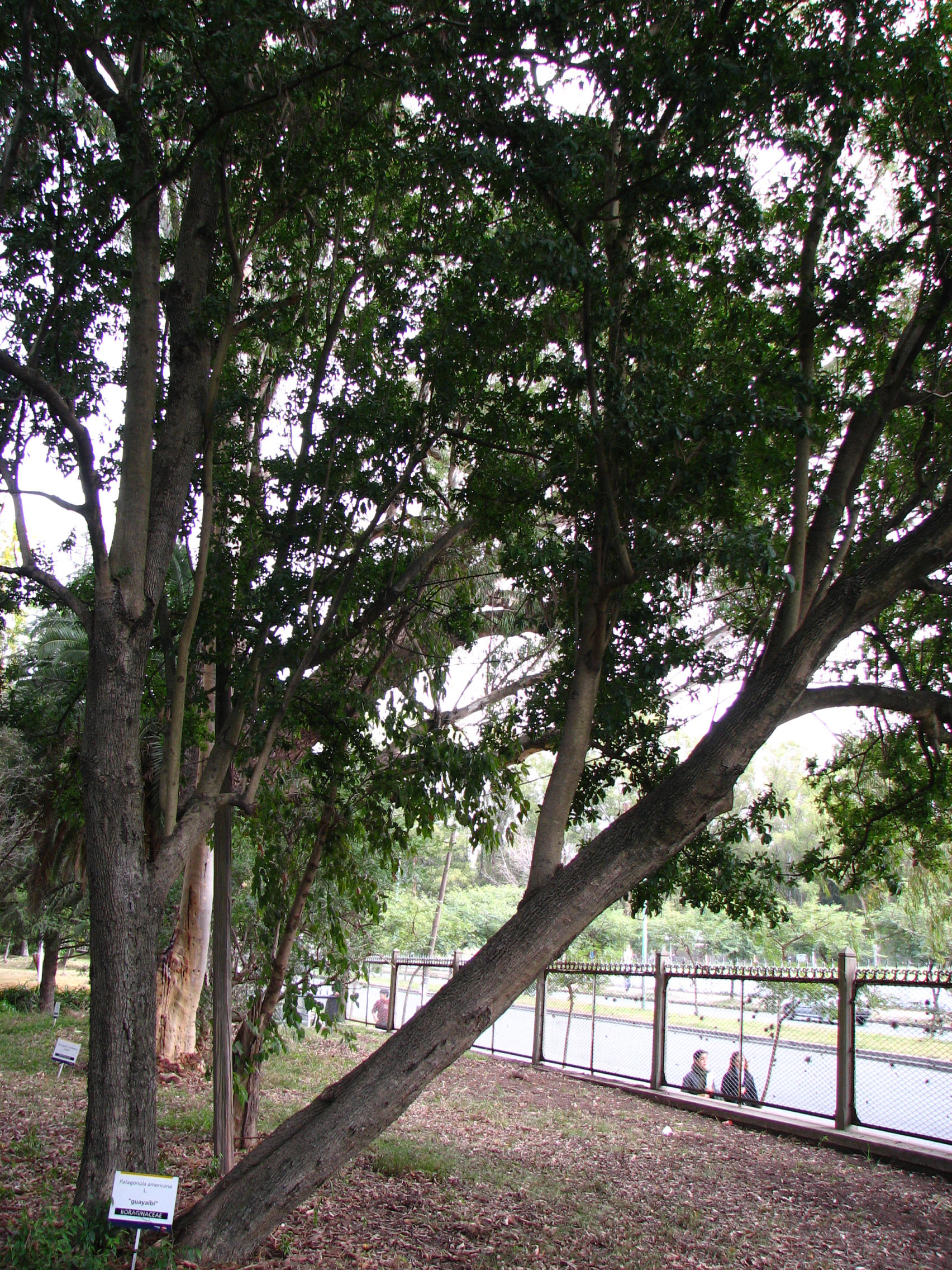 Ejemplar de Patagonula amaericana, en el Jardín Botánico "C. Spegazzini" de la ciudad de La Plata, Argentina.